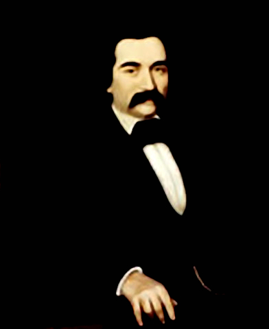 Retrato de Orélie Antoine de Tounens (Autor desconocido)